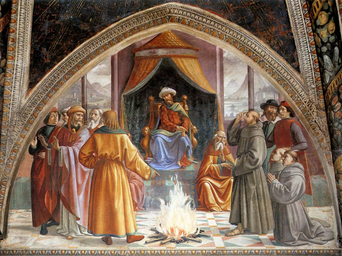 The Test of Fire (Cappella Sassetti, Santa Trinità, Florence)